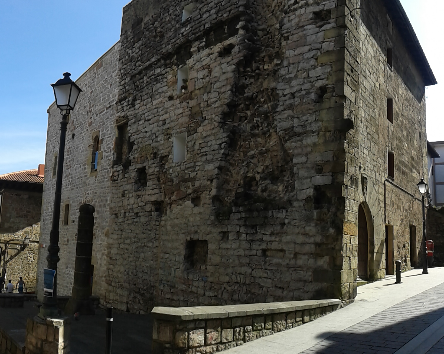 Torrekua dorretxea, Errenterian